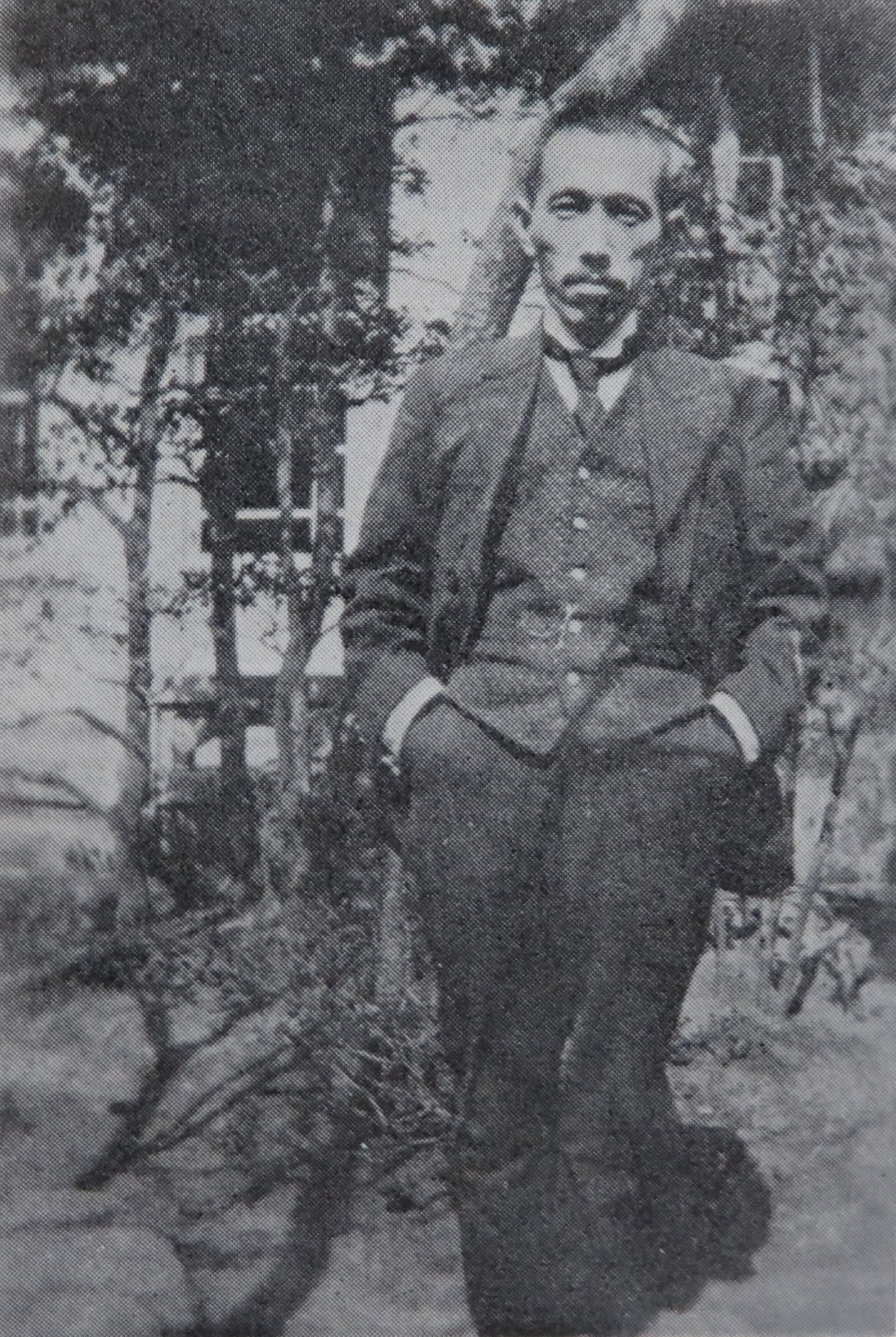 小林橘川（1882年10月1日 - 1961年3月16日）。名古屋新聞主筆時代の写真。